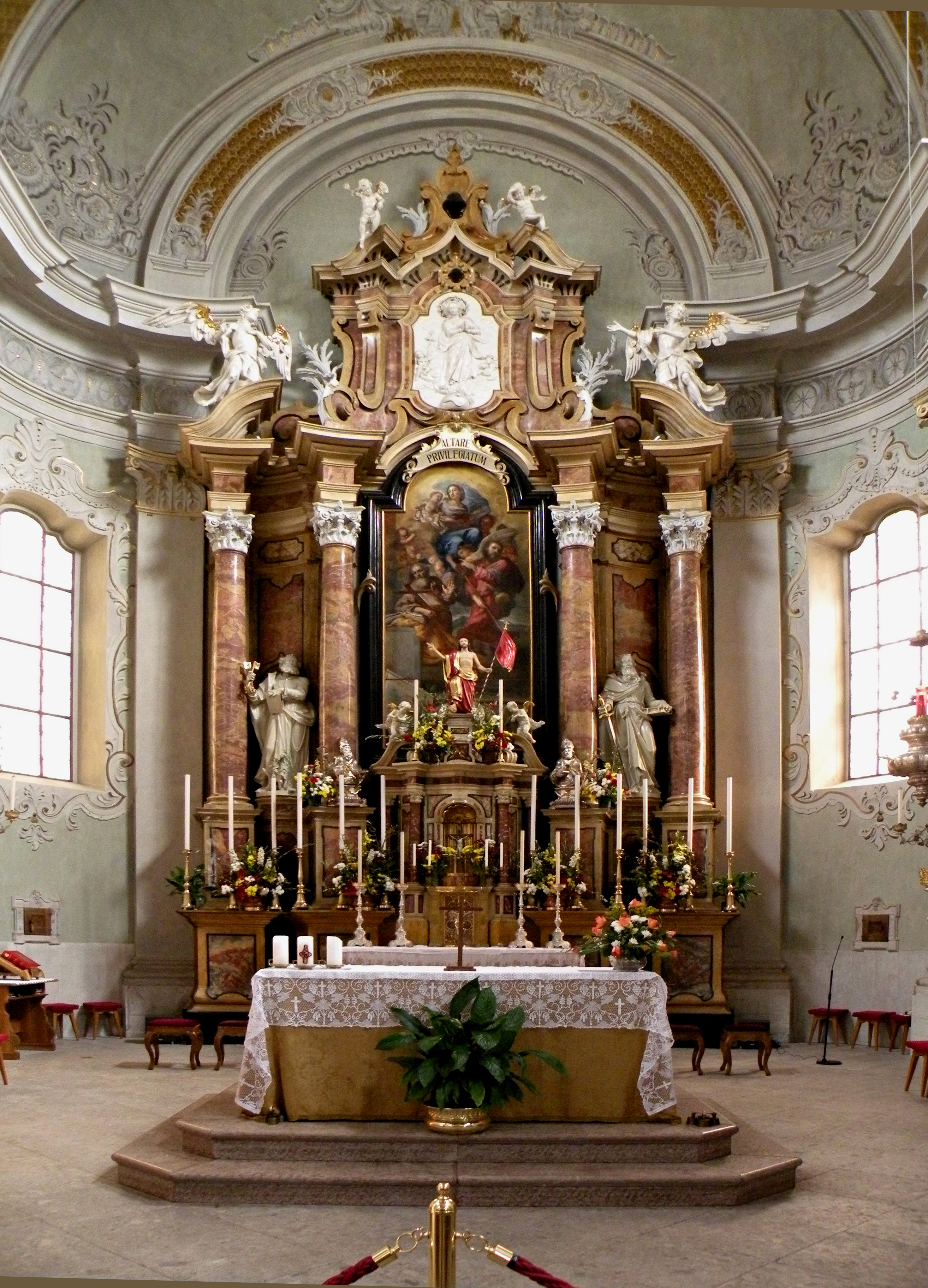 Алтарь в церкви Кортина д Ампеццо.